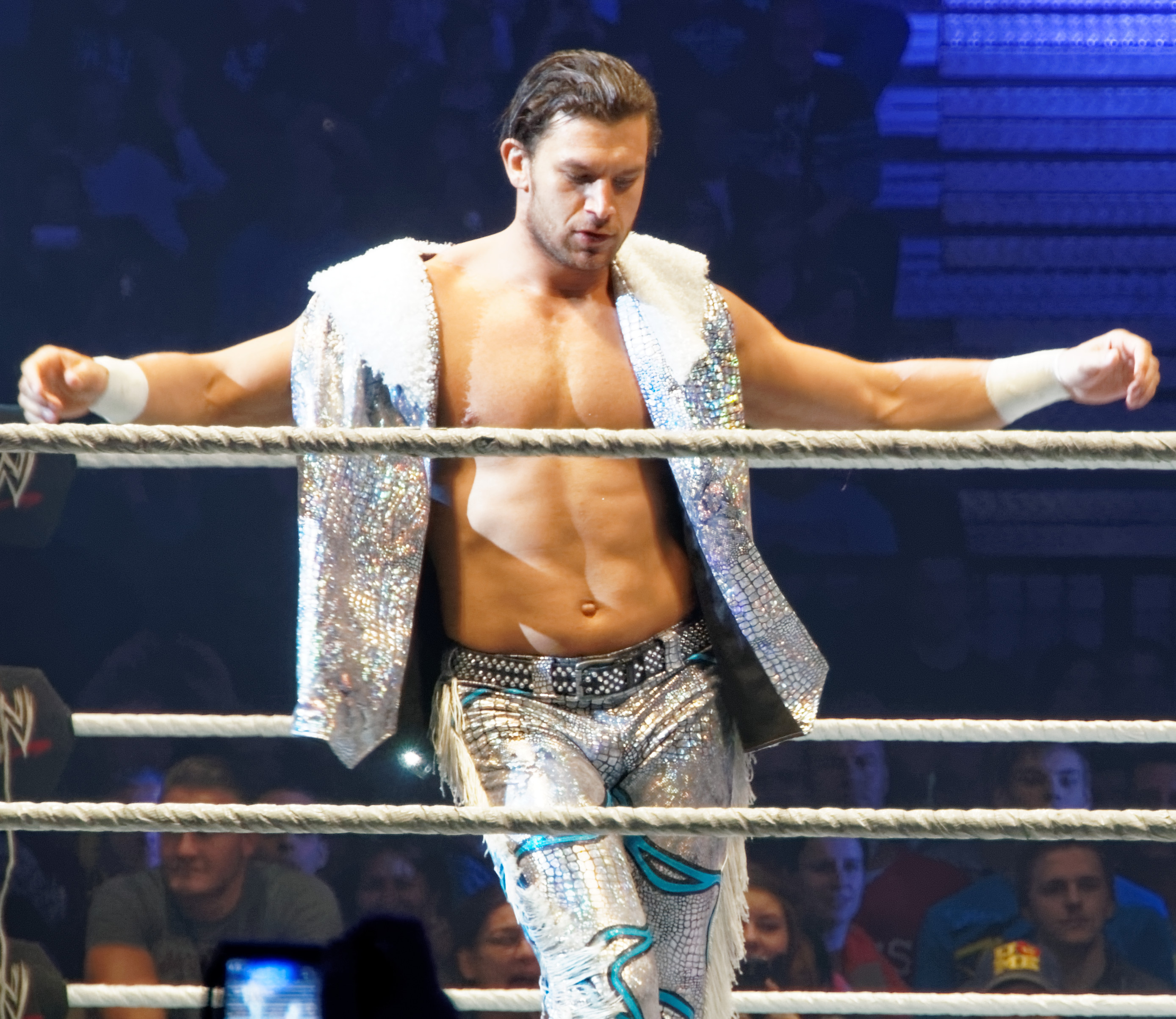 fandango